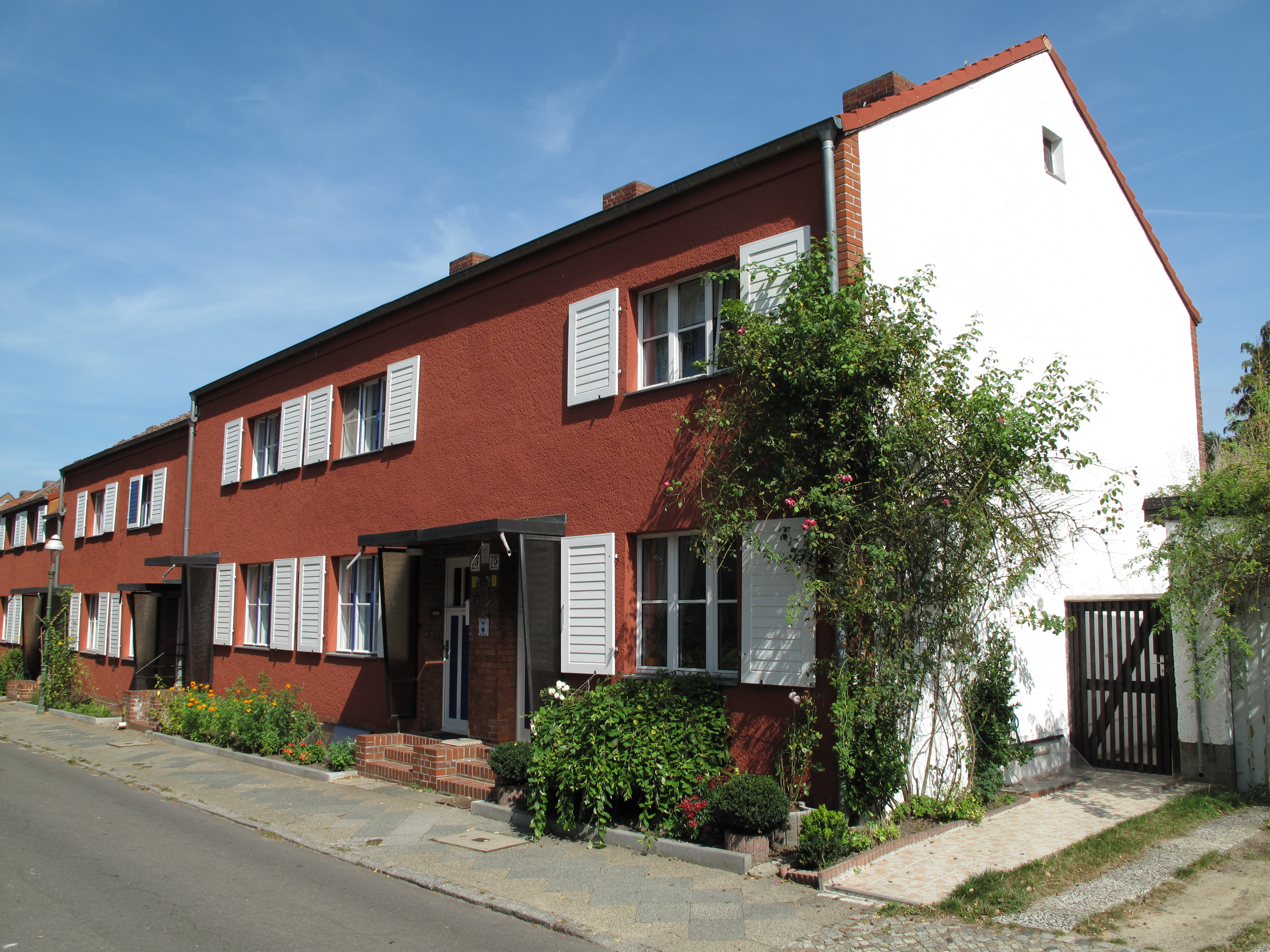 Berlin - Freie Scholle. Häuserzeile Steilpfad.